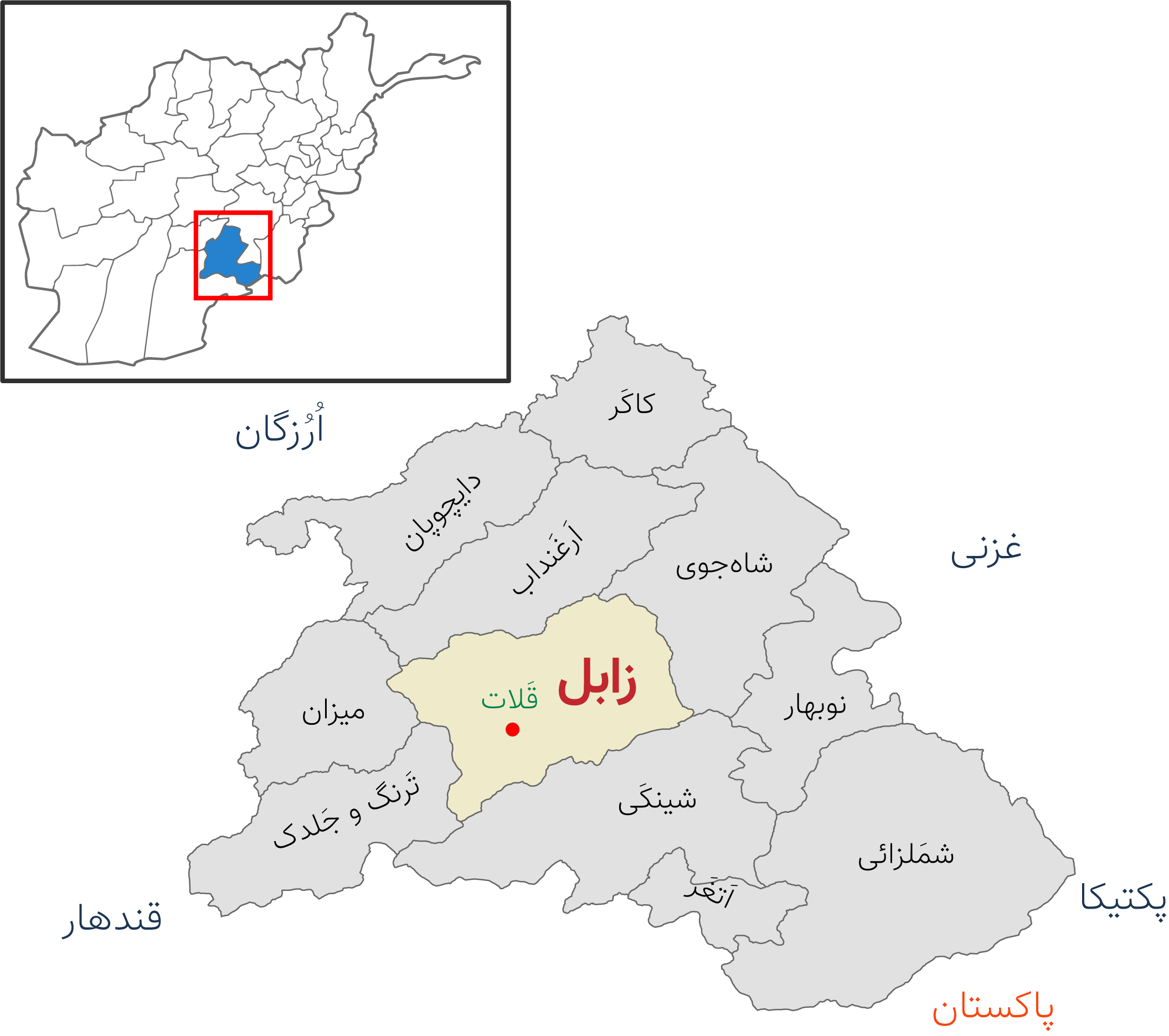 نقشه ولایت زابل